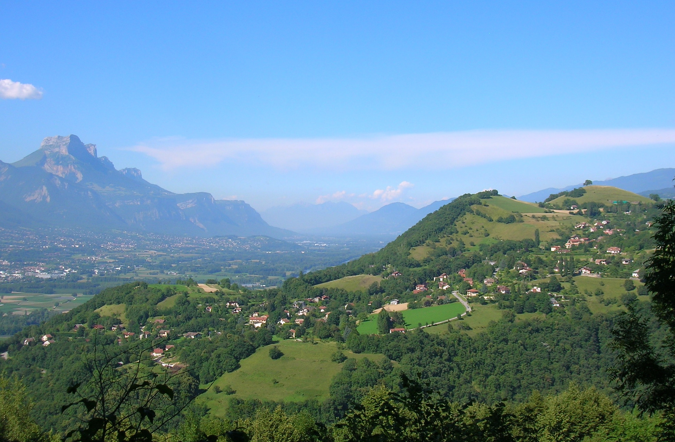 panorama di Venon (Isère)